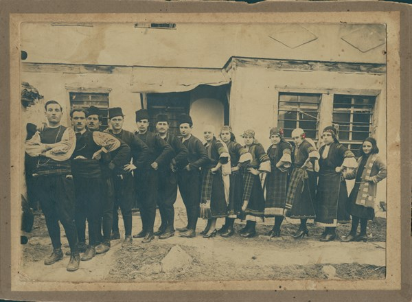 Снимка от изпълнение на „слядно хоро“ от самодейната група при Тракийското дружество в Кърджали. На снимката от ляво надясно: Пею Андреев, Илко Димитров, Панталей Палазов, Иван Митев, Марин Стоянов, Васил Попниколов, Стоянов, Мара Михайлова, Мара Ковачева, Русана Ив. Митева, Ел. Атанасова, Станка Войводова.